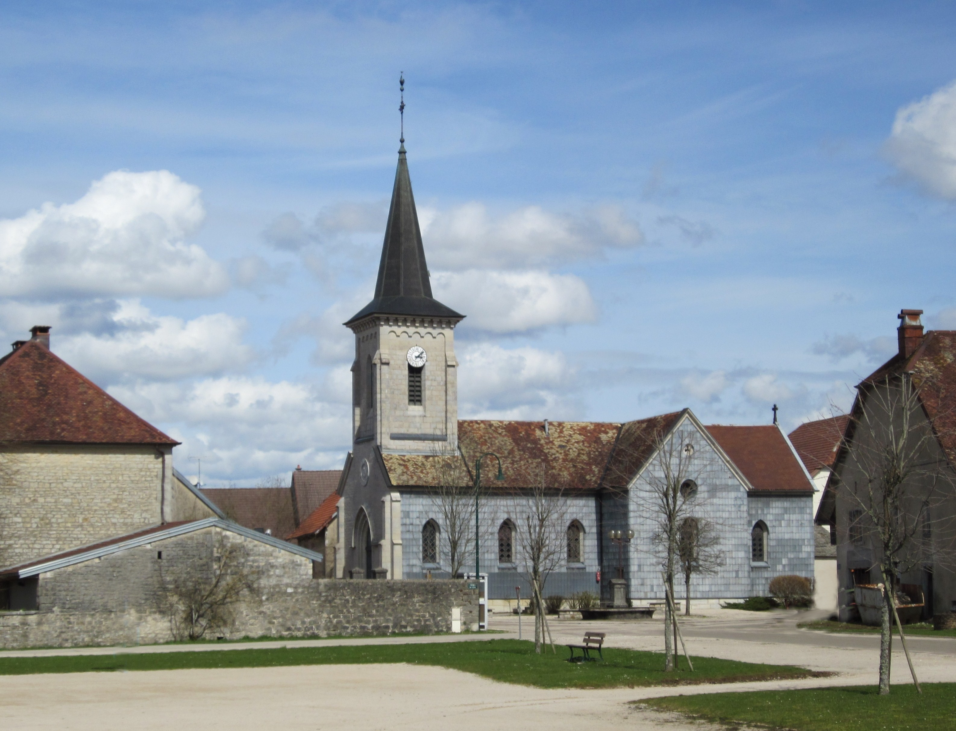 Vannoz (Jura) - église et fontaine au centre du village